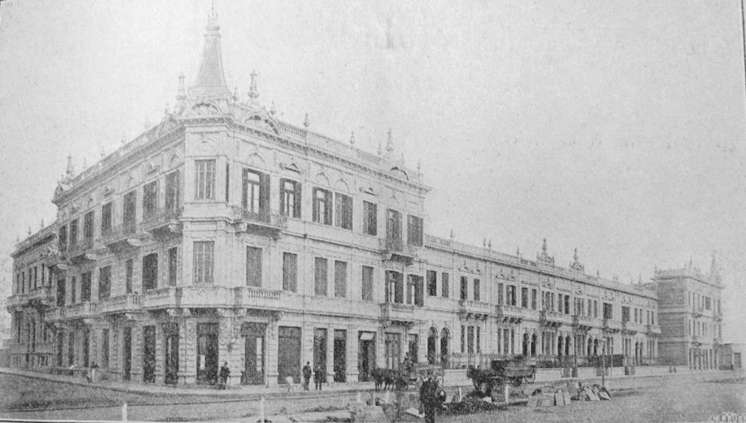 Edificio de renta, propiedad de la Compañía de Seguros "La Inmobiliaria". Fue proyectado por el arq. Juan Antonio Buschiazzo y se encontraba en la calle Fray Justo Santa María de Oro, entre Güemes y la Av. Santa Fe). Barrio de Palermo, ciudad de Buenos Aires, Argentina.